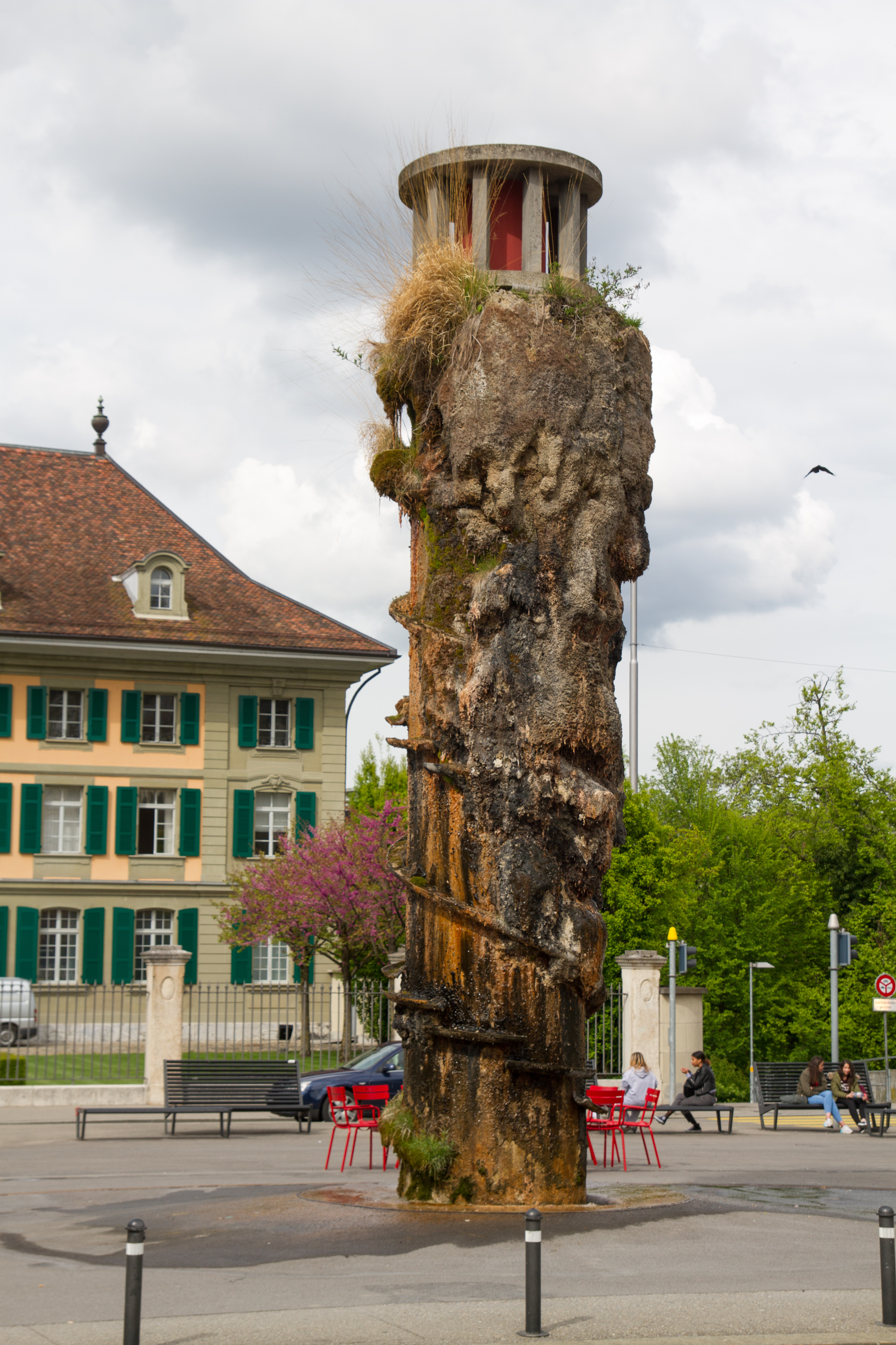 Meret Oppenheim-Brunnen